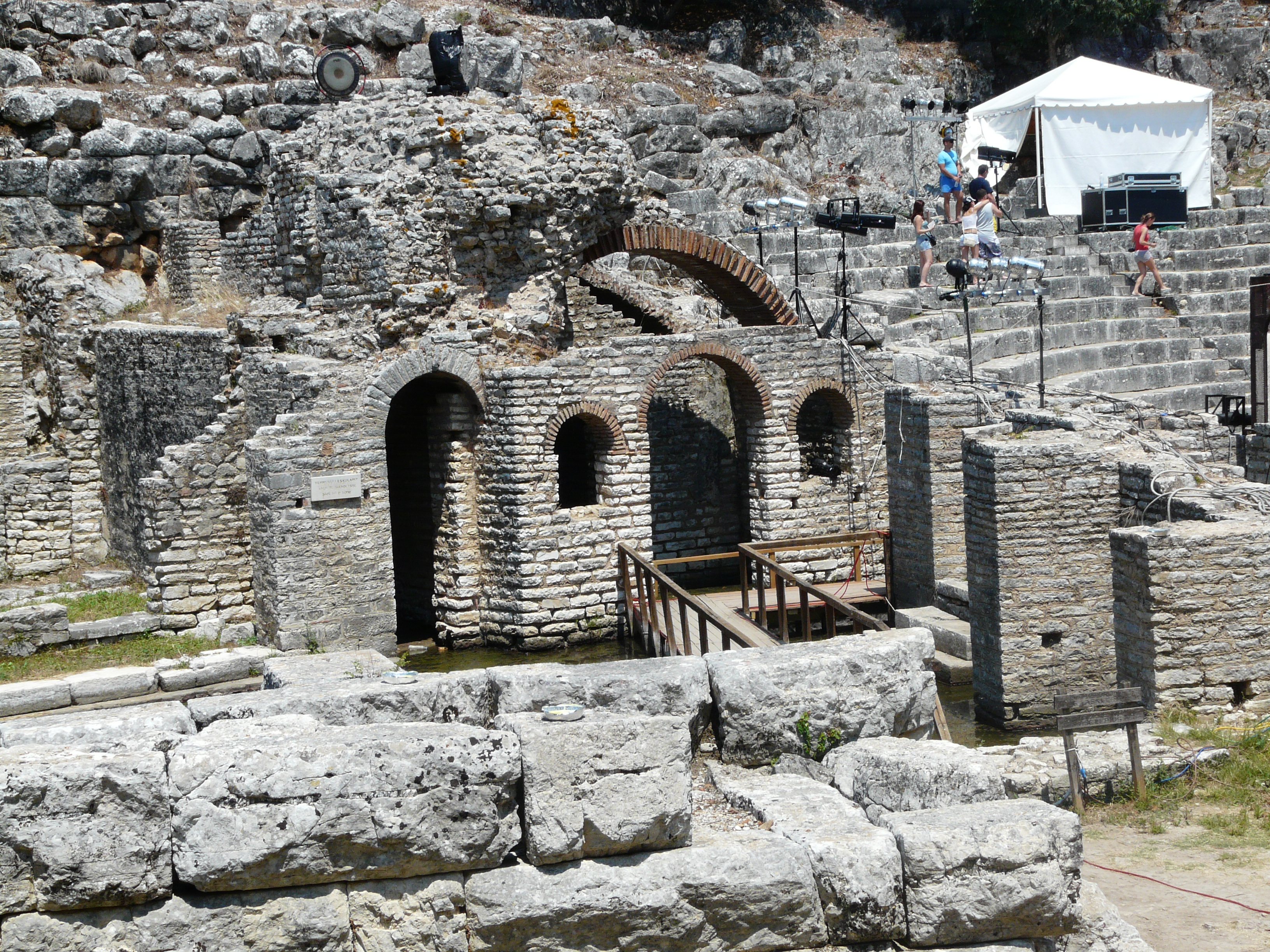 Butrint: Asclepios Temple.